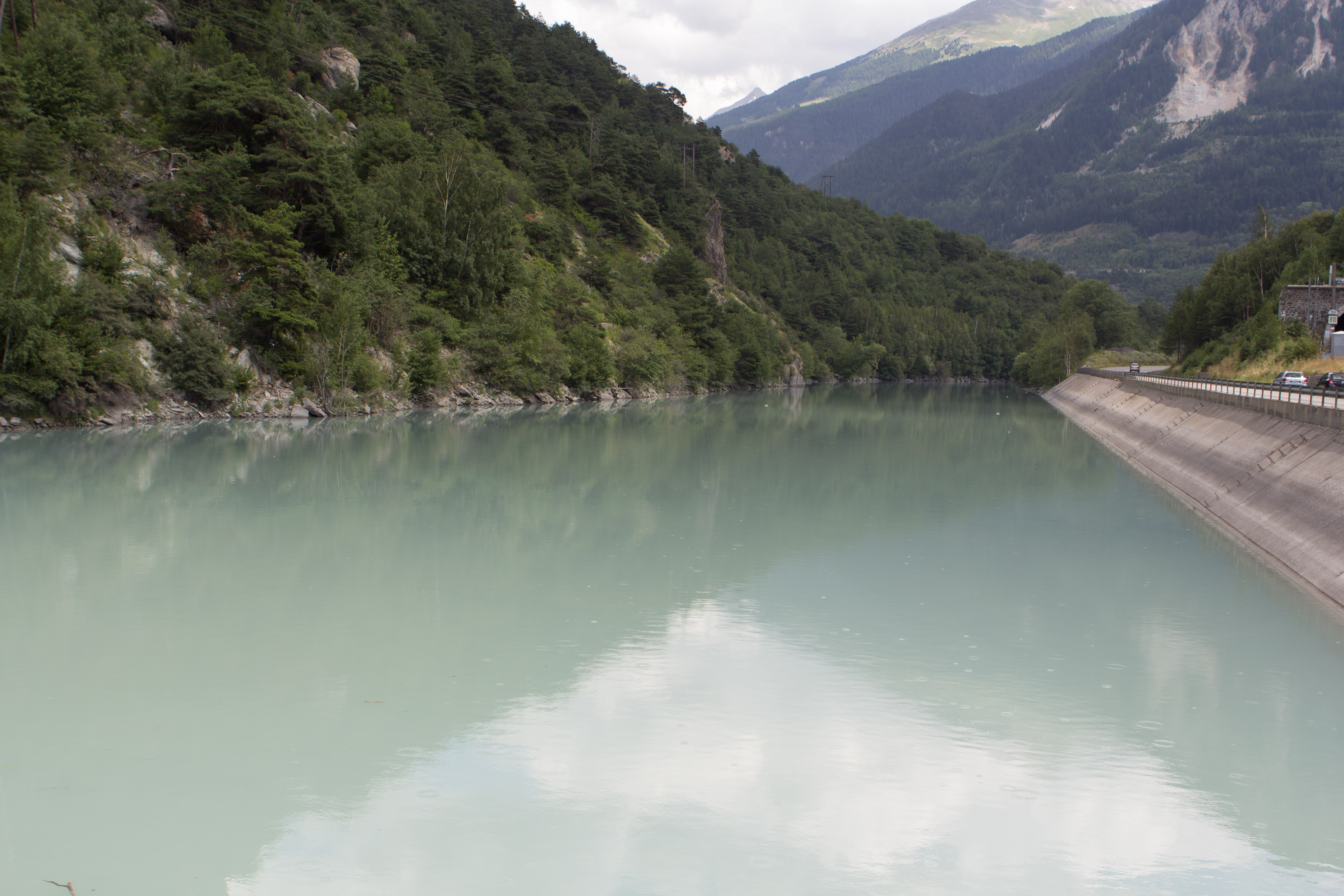 barrage hydraulique du freney sur la rivière l'Arc (Freney - Savoie - France)